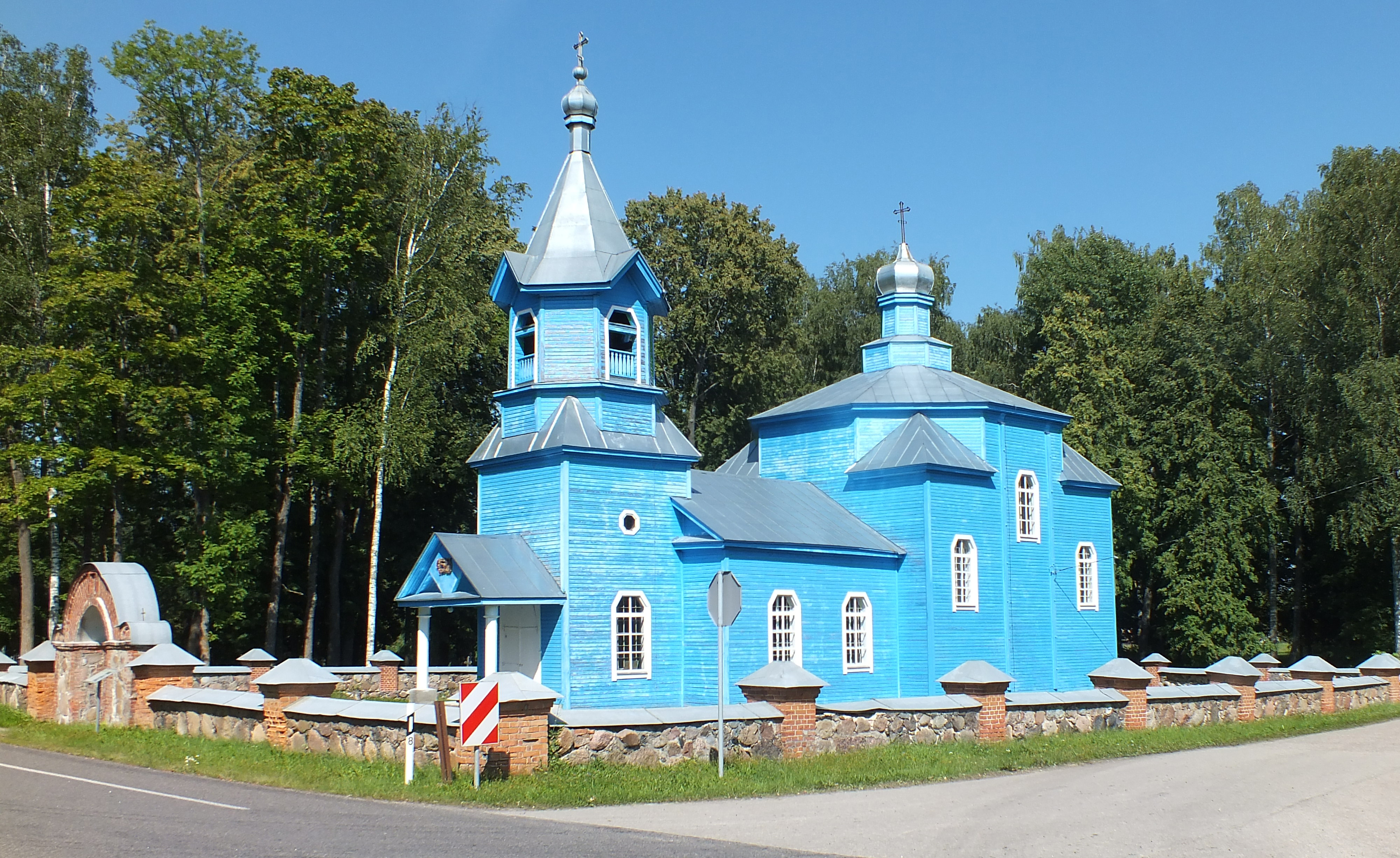 Pudinovas pareizticīgo baznīca